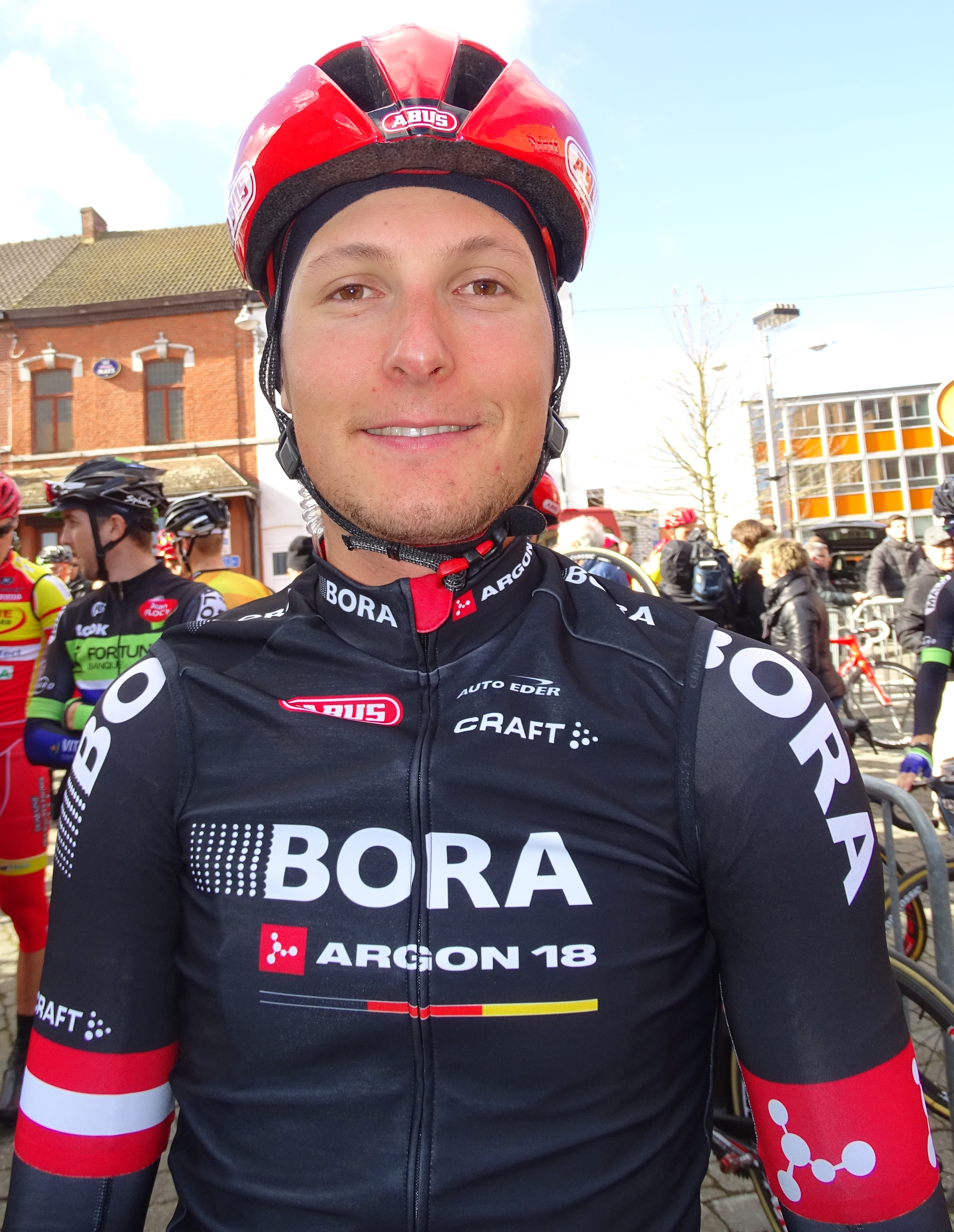 Reportage réalisé le mercredi 2 mars à l'occasion du départ du Samyn des Dames 2016 et du Samyn 2016 à Quaregnon, Belgique.